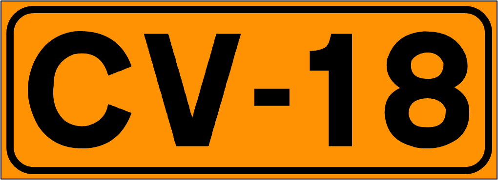 Inidcador de la Carretera de la Comunidad Valenciana CV-18